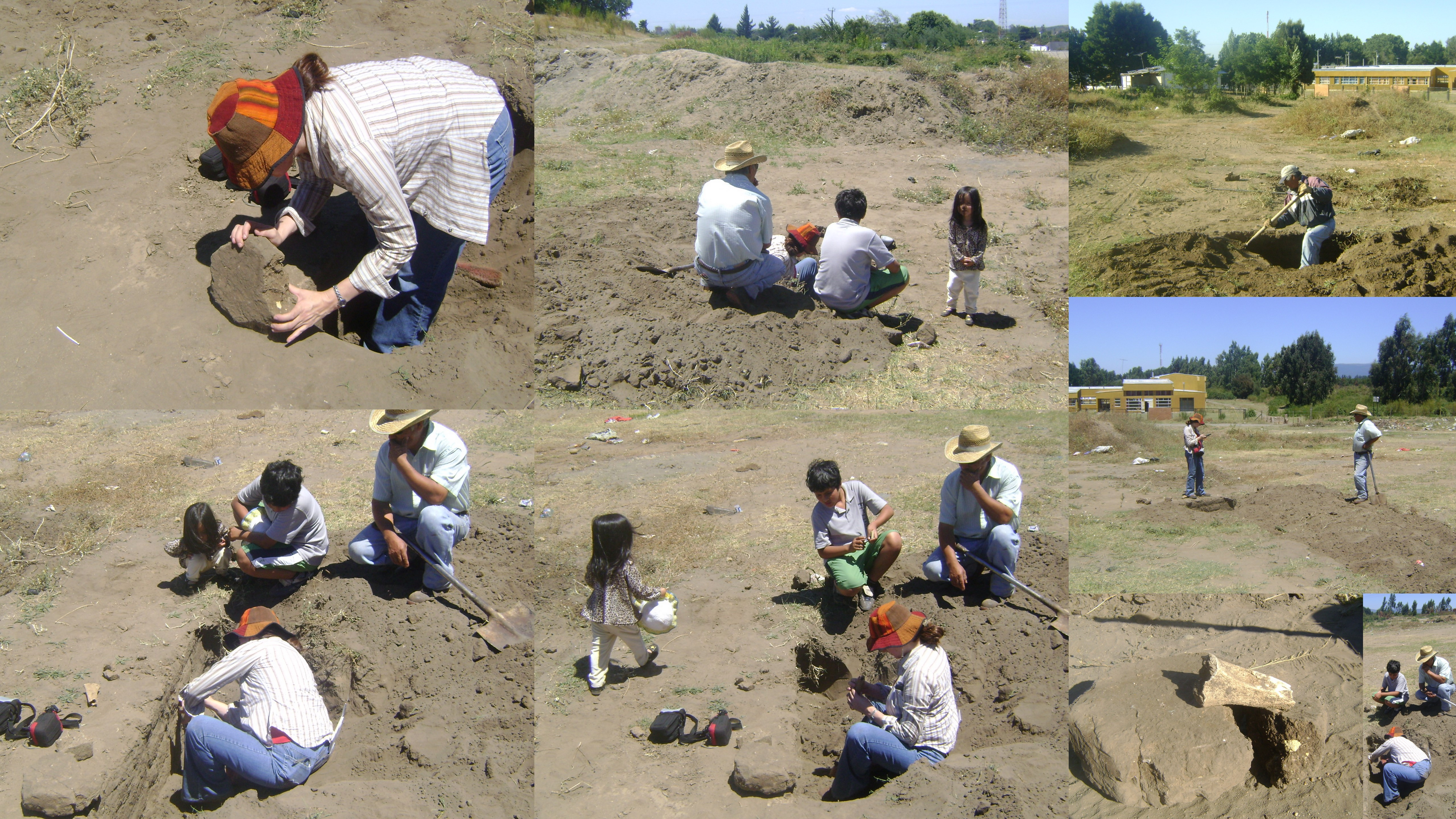 El 8 de Enero de 2009, una arqueologa del CMN explora, mide y georeferencia un muro de adobes enterrado en la ladera sur del cerro Mariman de Negrete. (8-1-2009). Luego de ello, el 4 de Agosto de 2009, es declarado y protegido por ley 17.288 como Monumento Arqueologico por el Consejo de Monumentos Nacionales de Chile.